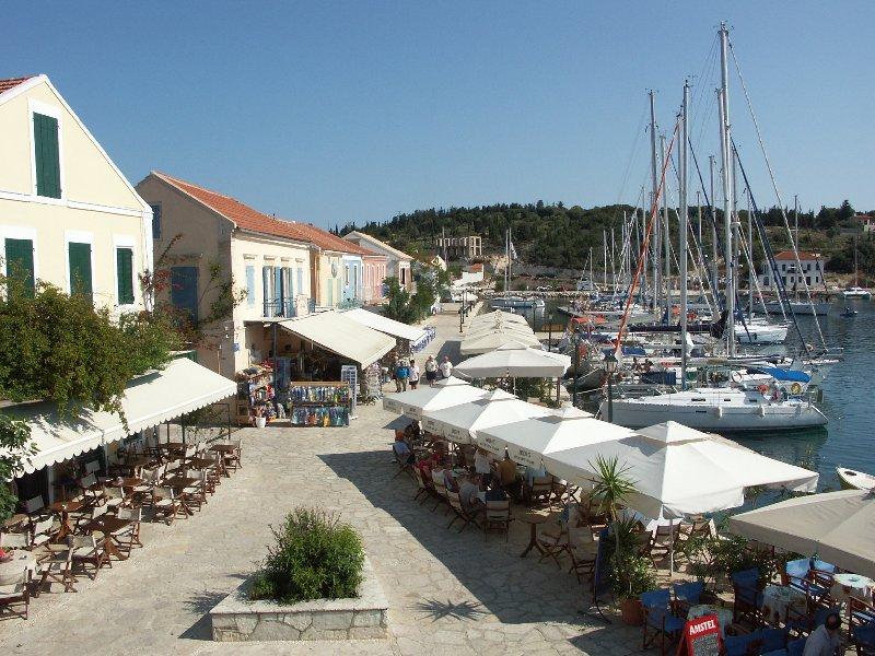 Fiskardo.